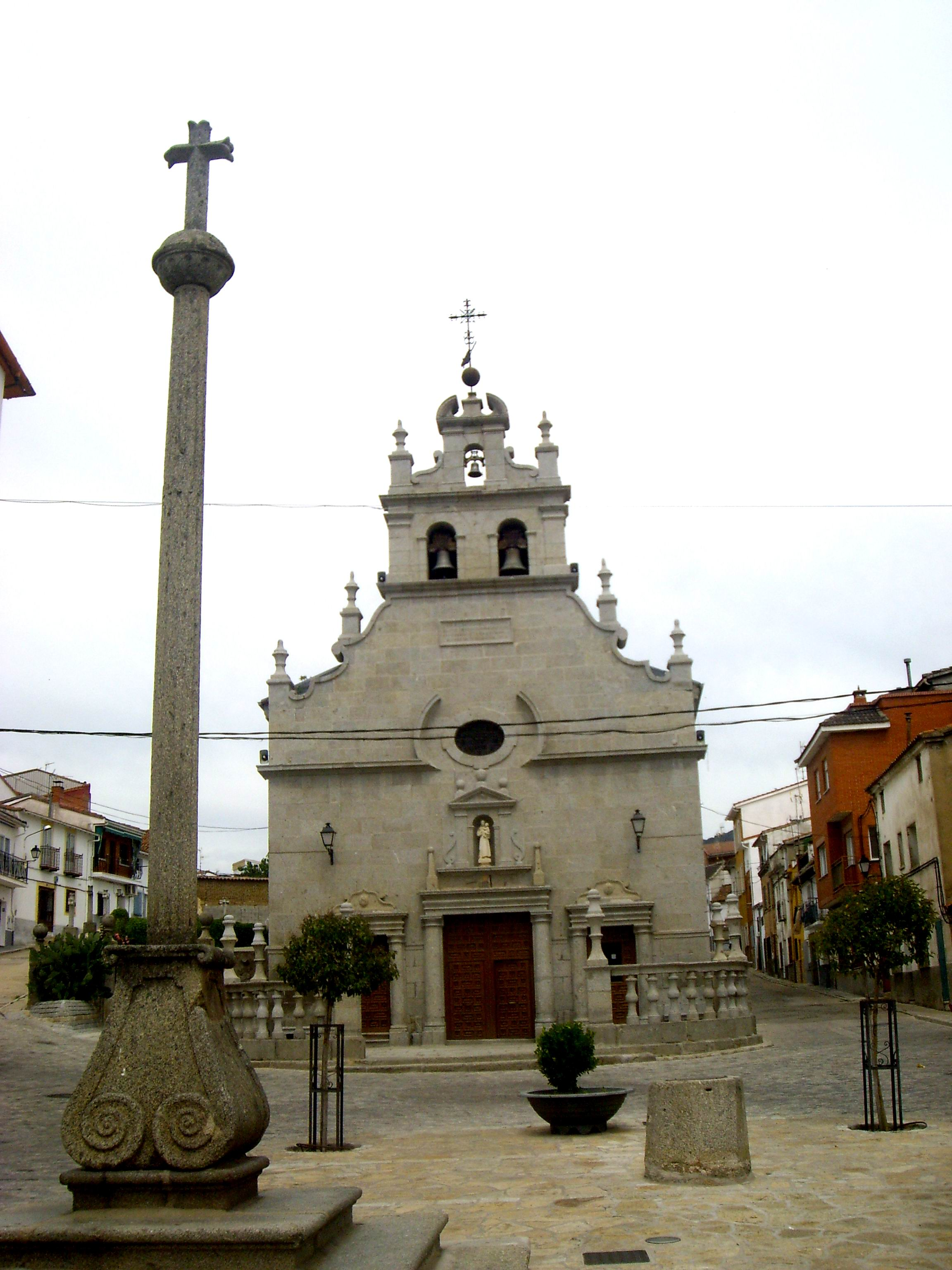 Iglesia de El Tiemblo, Avila, España